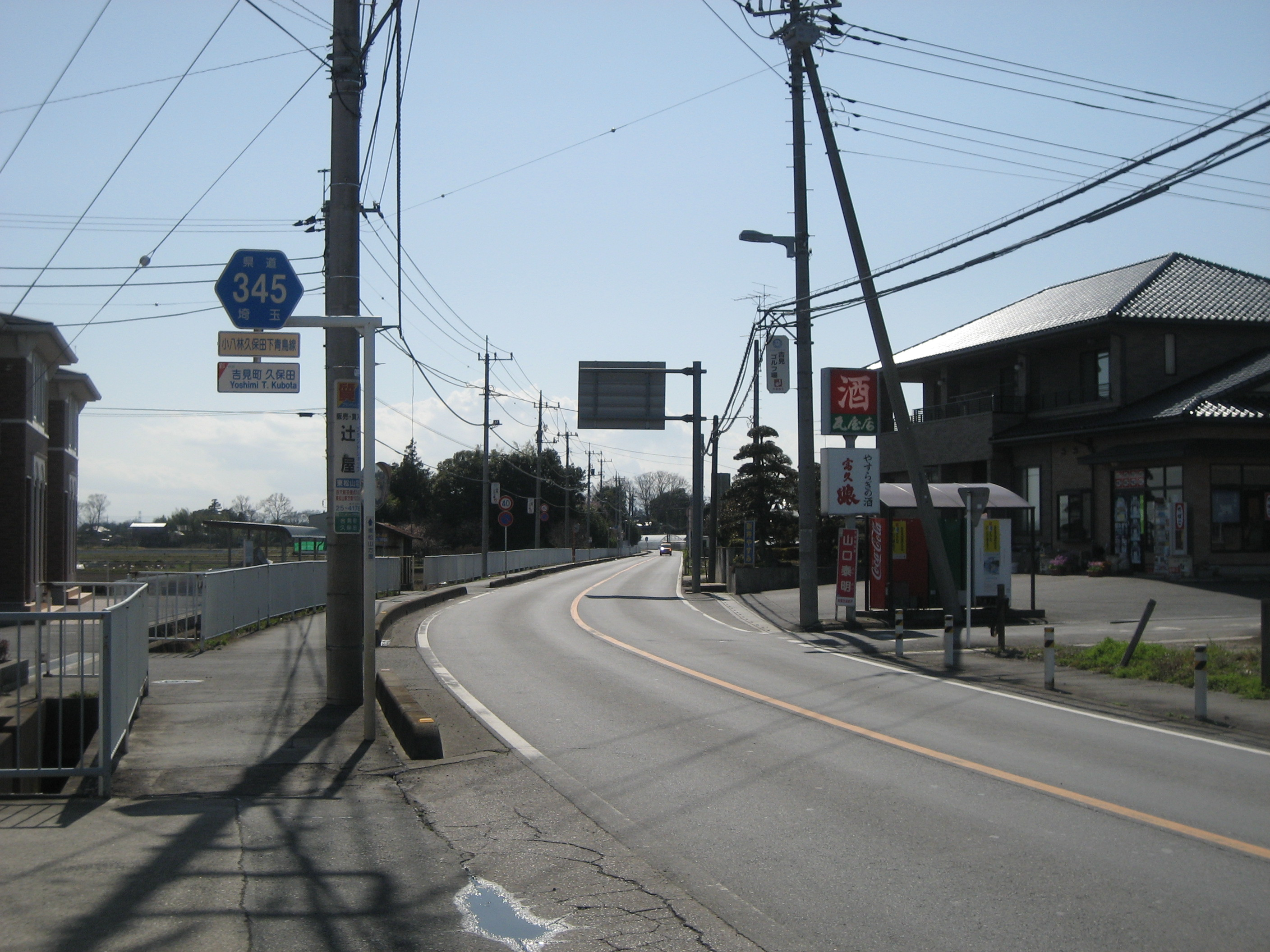 埼玉県道345号線吉見町内